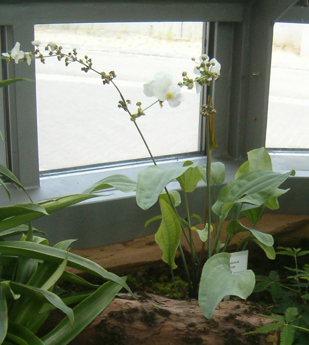 At Botanical Gardens Berlin-Dahlem Species Echinodorus rglaucus